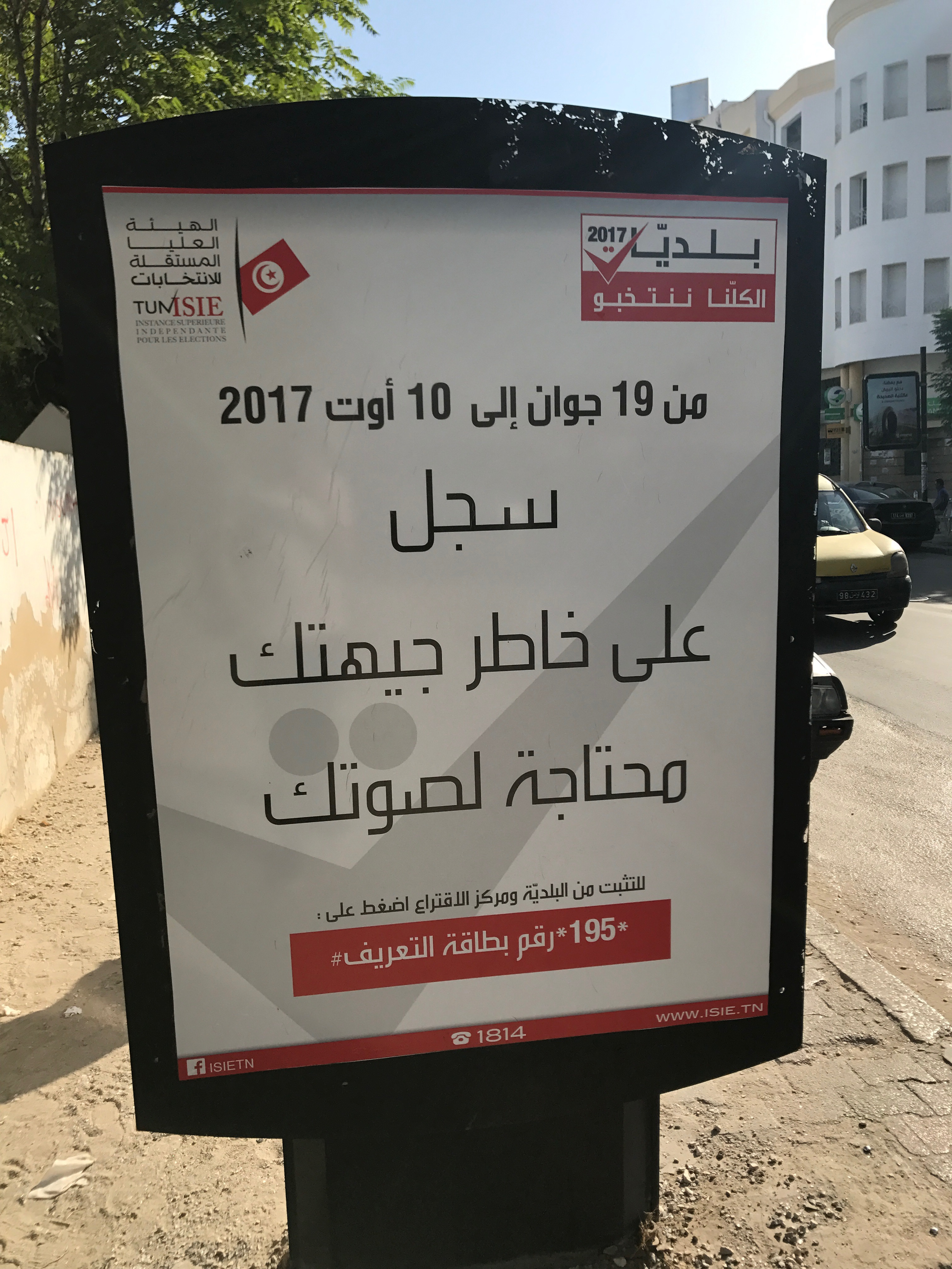 Panneau publicitaire de l'ISIE pour les élections municipales 2017 en Tunisie.